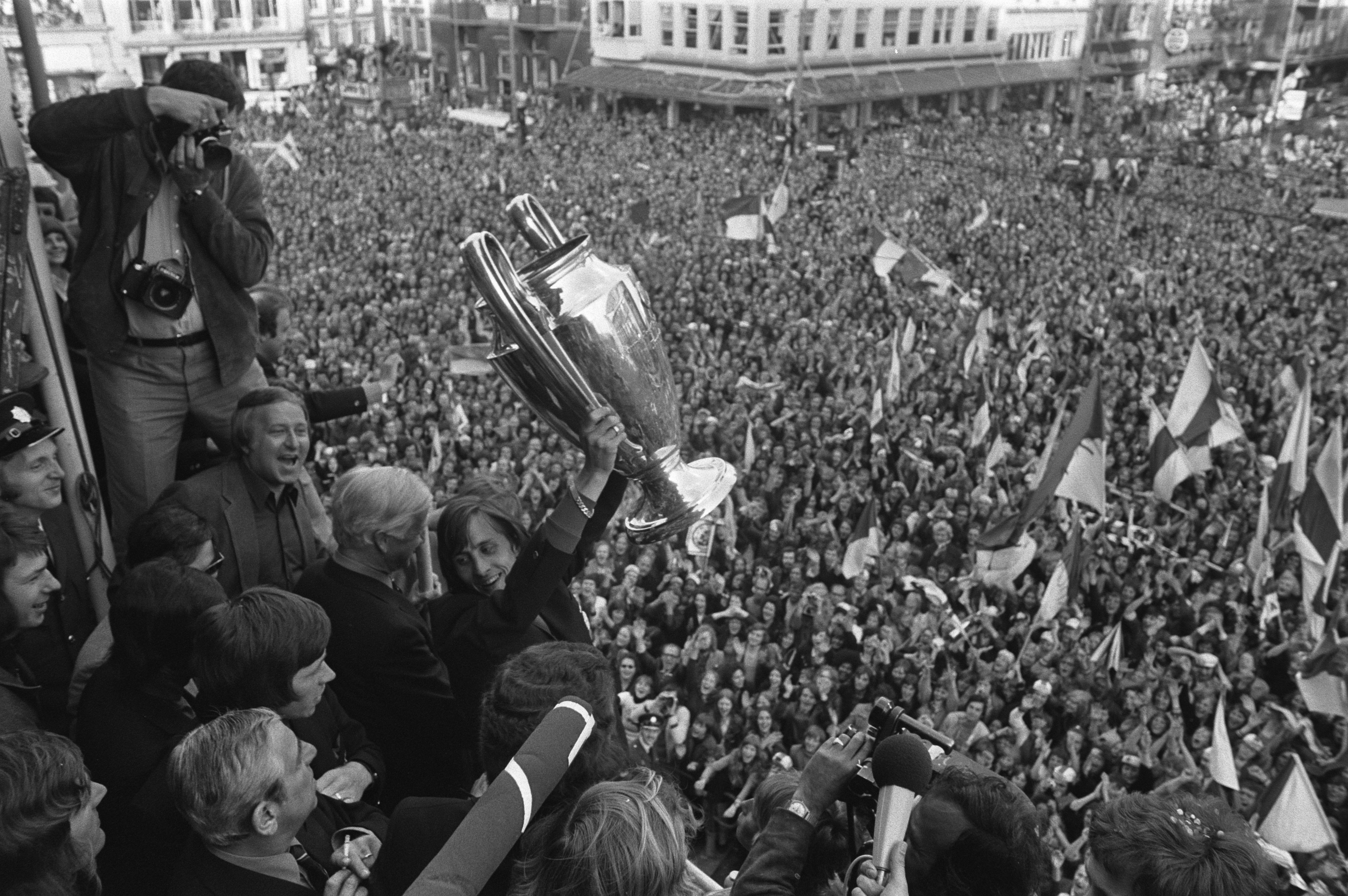 Collectie / Archief : Fotocollectie Anefo Reportage / Serie : Huldiging van de Ajax-spelers op het balkon van de Schouwburg in Amsterdam na het winnen van de Europacup I-finale Beschrijving : Ajax-speler Johan Cruyff met de cup Annotatie : negatiefstrooknummer 16: Johan Cruijff met de cup Datum : 1 juni 1972 Locatie : Amsterdam, Noord-Holland Trefwoorden : huldigingen, sport, sportprijzen, voetbal Persoonsnaam : Hulshoff, Barry Fotograaf : Fotograaf Onbekend / Anefo Auteursrechthebbende : Nationaal Archief Materiaalsoort : Negatief (zwart/wit) Nummer archiefinventaris : bekijk toegang 2.24.01.05 Bestanddeelnummer : 925-6412 Reacties Geplaatst door Maaike op 27 augustus 2012 - 21:13. Ajax-speler Johan Cruyff met de cup. Stadsschouwburg, Leidseplein